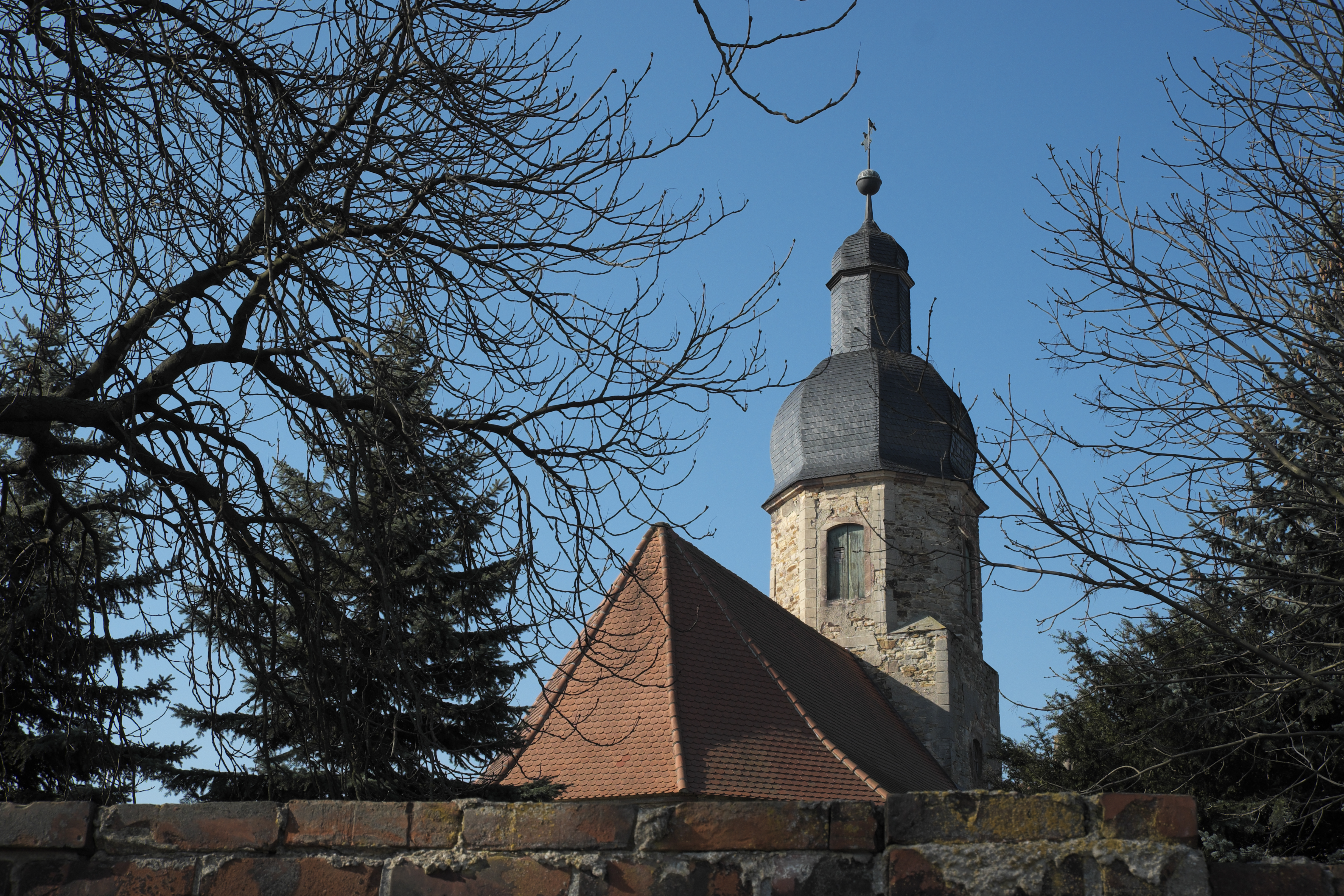 Kirche in Oberklobikau, einem Ortsteil von Bad Lauchstädt im Saalekreis in Sachsen-Anhalt/Deutschland, Kirchturm